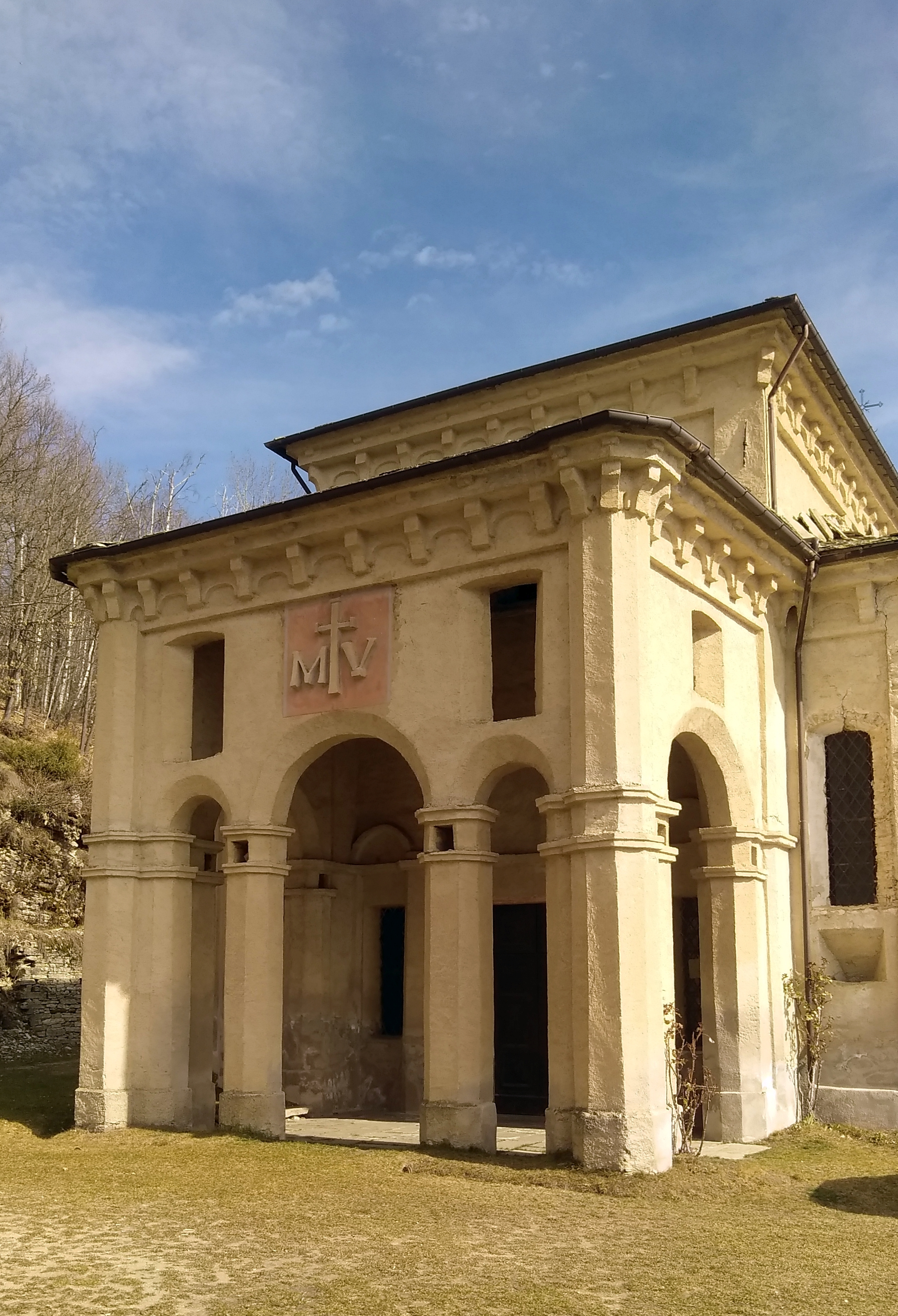 Santuario della Madonna della Betulla (Val Variata, CN): la facciata